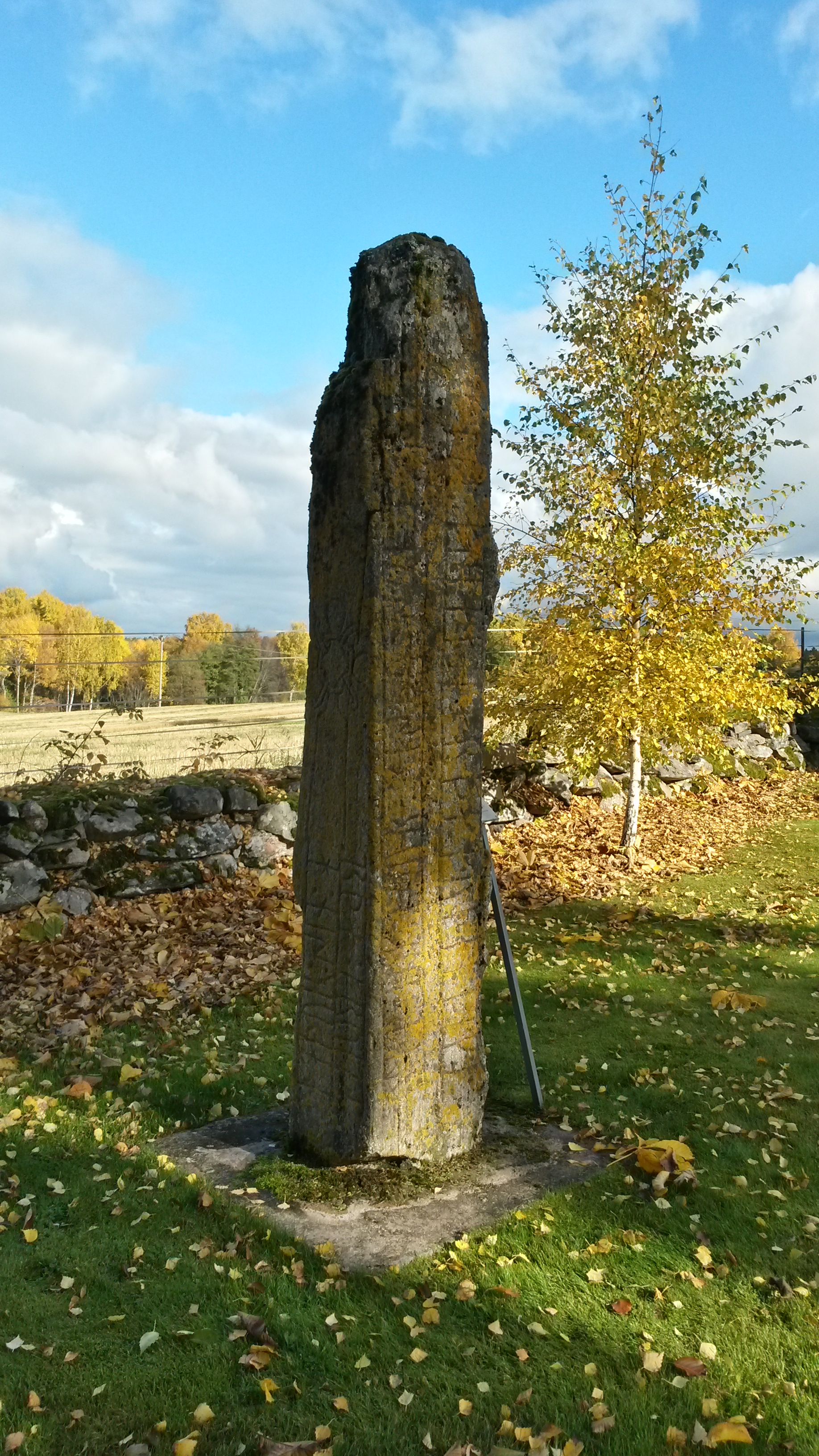 (Hol 151, Runristning)